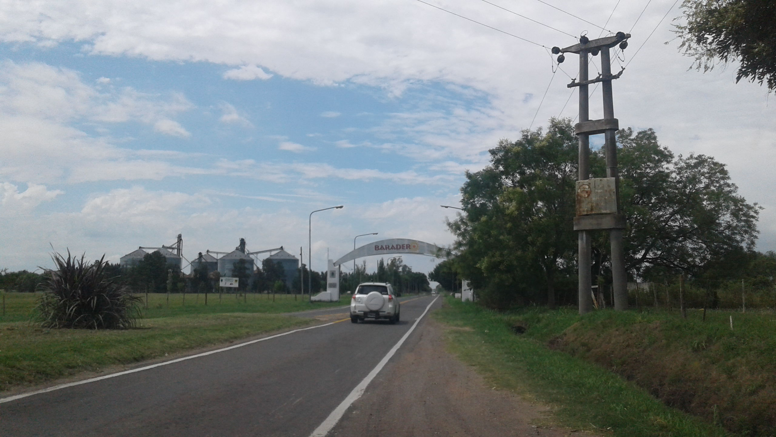 Entrada a la ciudad de Baradero, provincia de Buenos Aires, Argentina.